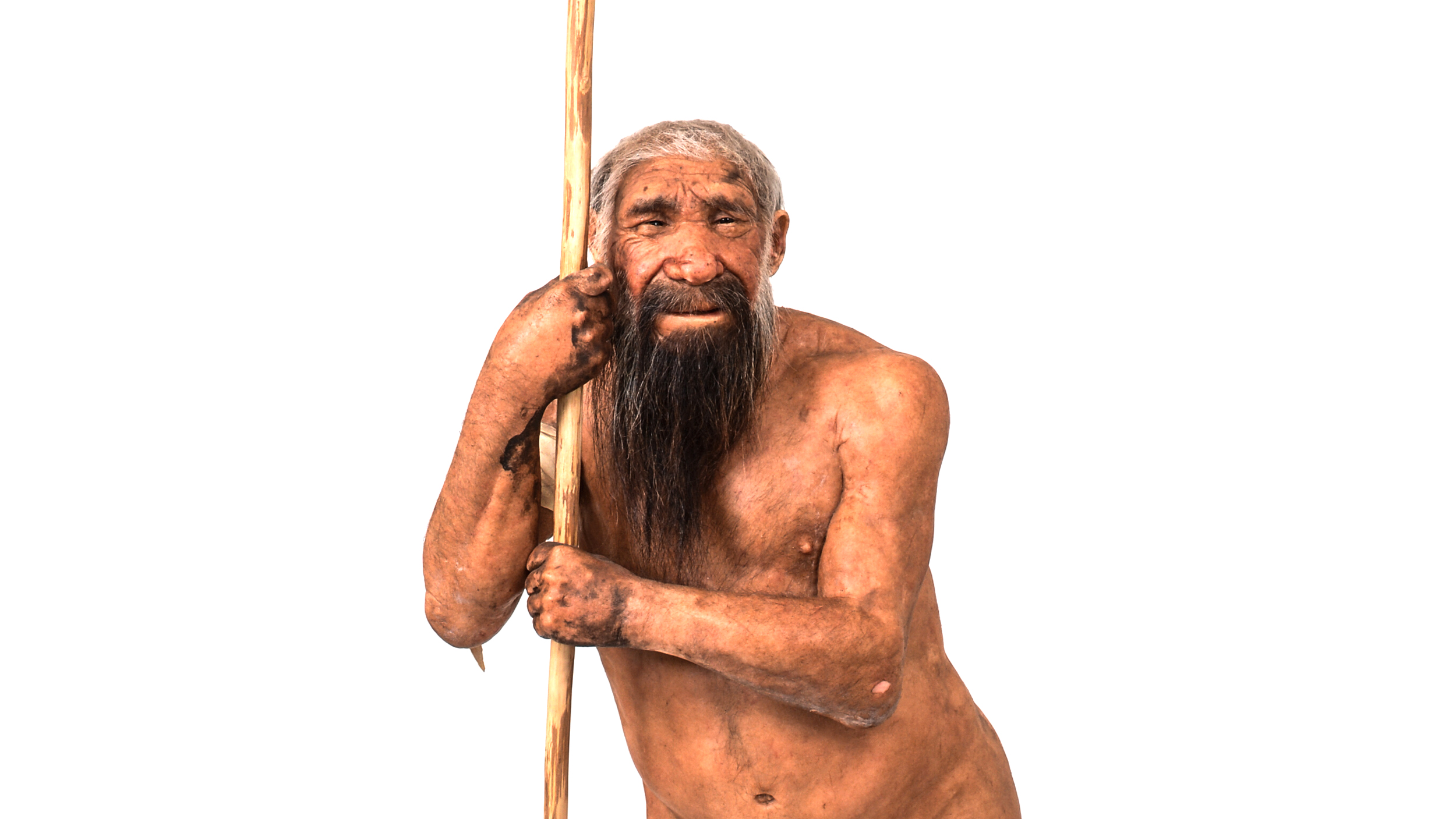 Ricostruzione